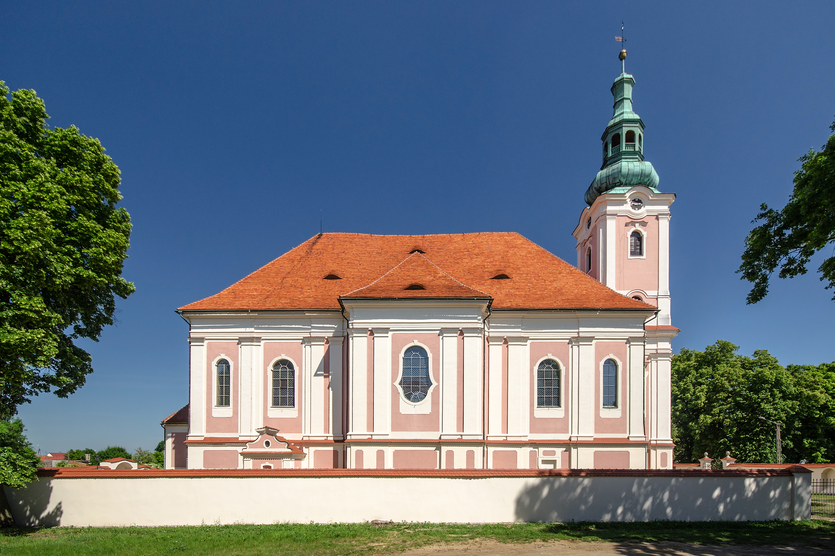 Siciny, kościół par. p.w. św. Marcina Biskupa, 1736-1742, XIX